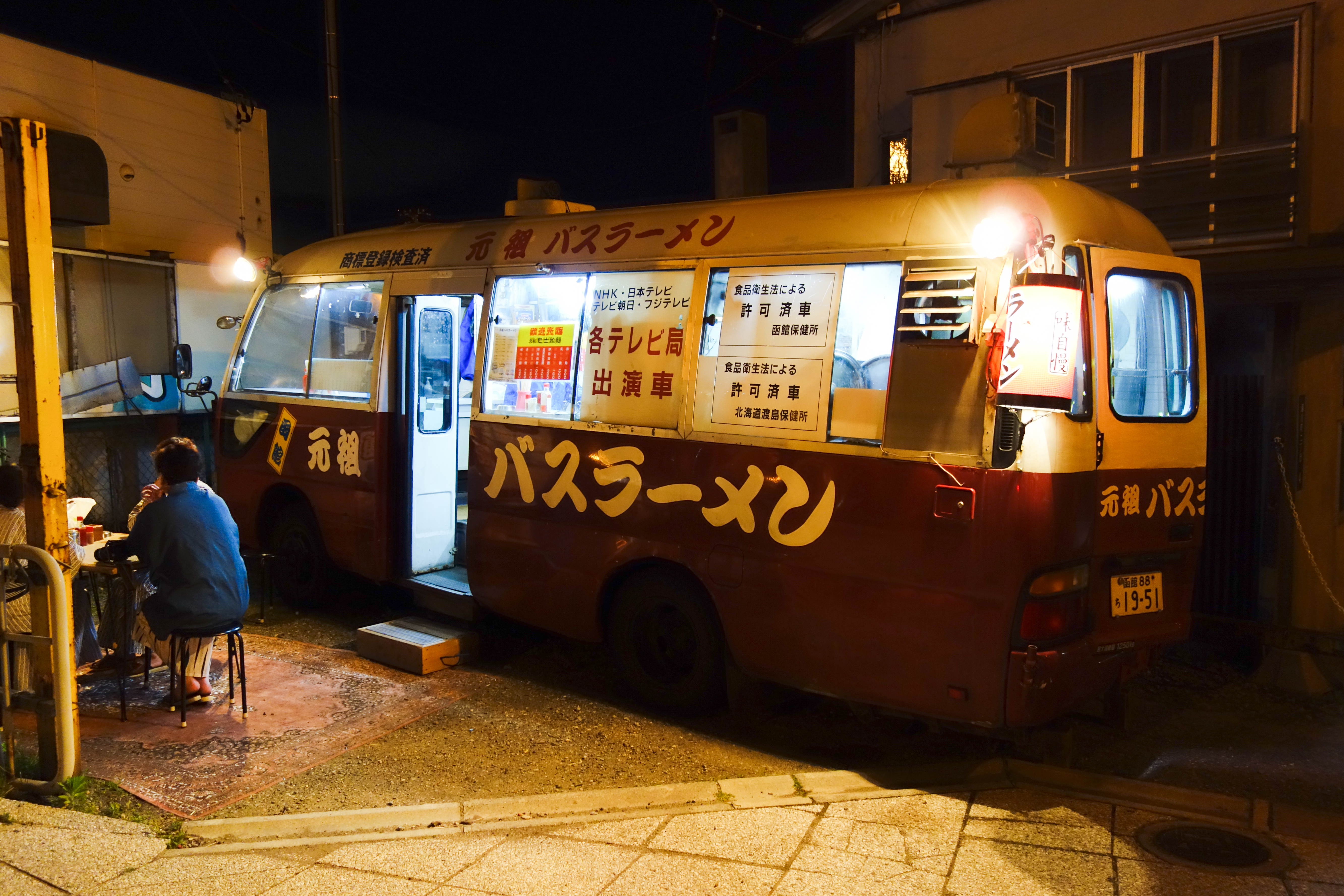 バスラーメン元祖バスラーメン 丸寿 （北海道函館市）